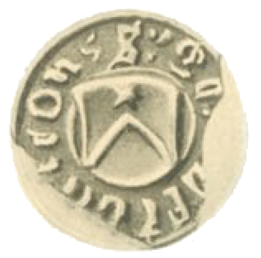 Kihlakunnantuomari Gudmund Larssonin (k. 1537) sinetti.